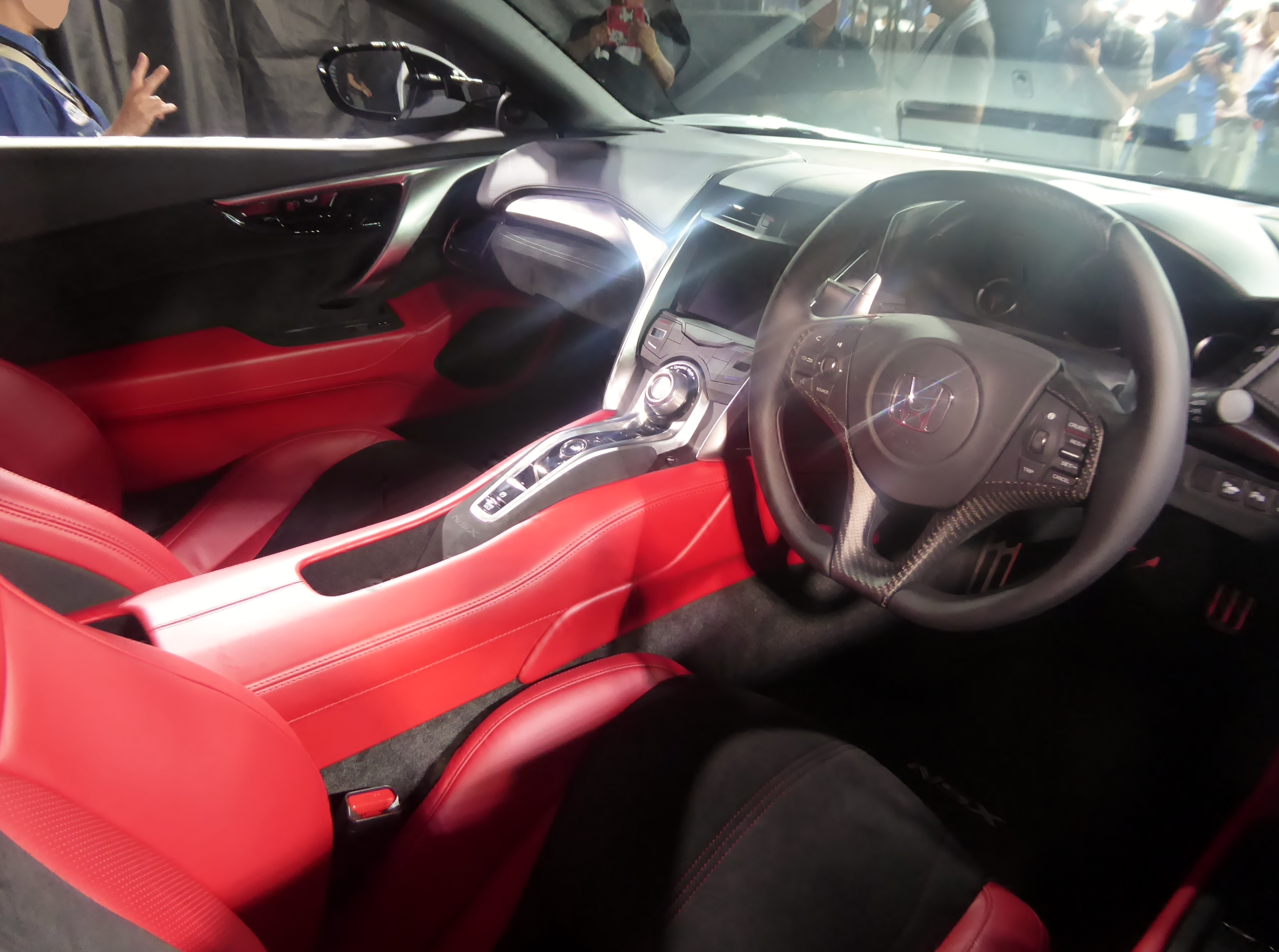 CAA-NC1型ホンダ・NSXを撮影。